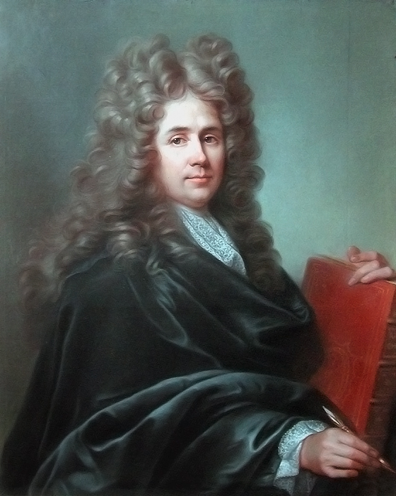 Premier architecte du roi et intendant général des Bâtiment en 1708